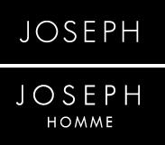 JOSEPH (clothing brand) logo